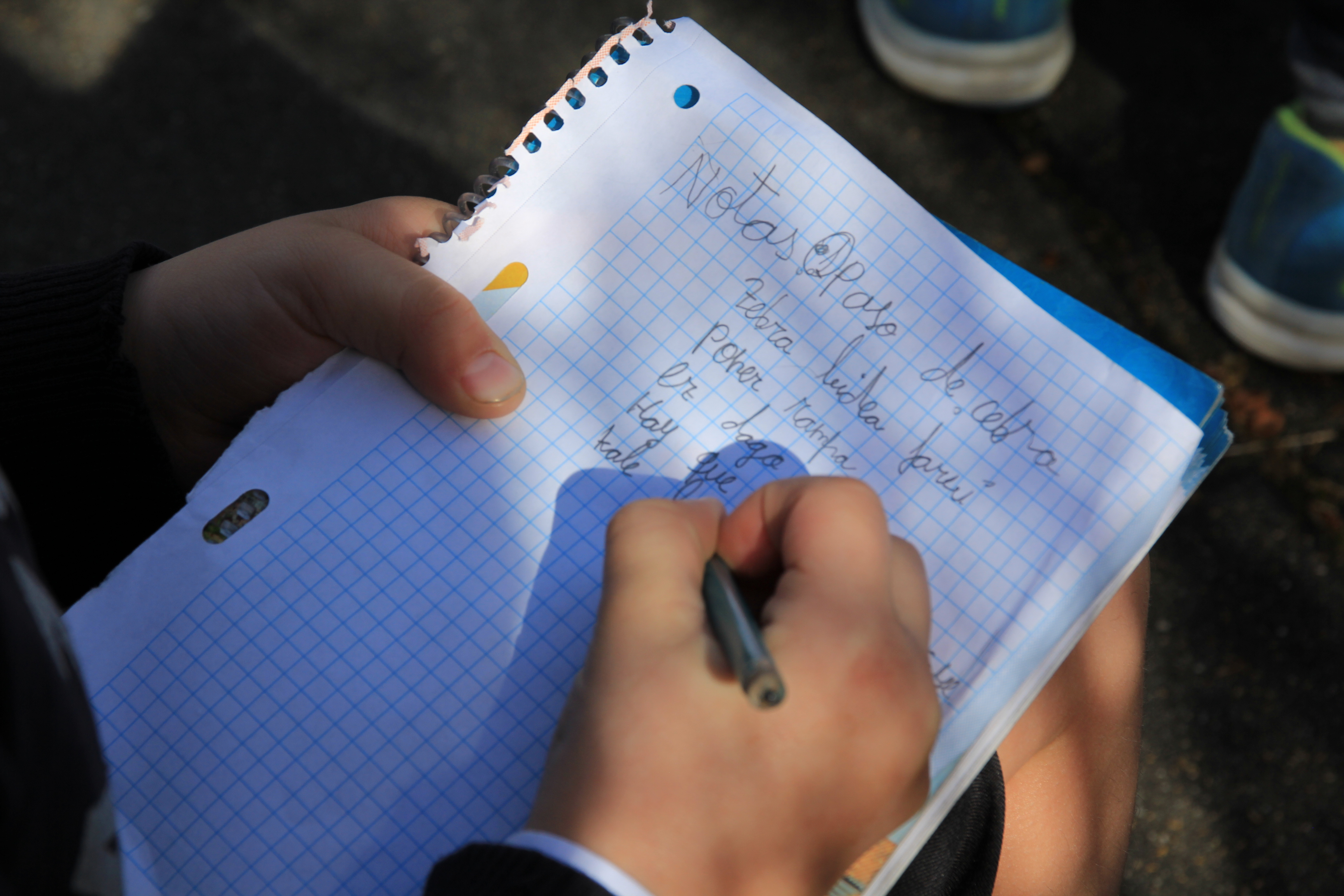 Leioan egindako ekimena. Herria hobetzeko txartel berdeak eta gorriak jarri zituzten. Egindako txartelen zerrenda bidali zitzaion udalari.